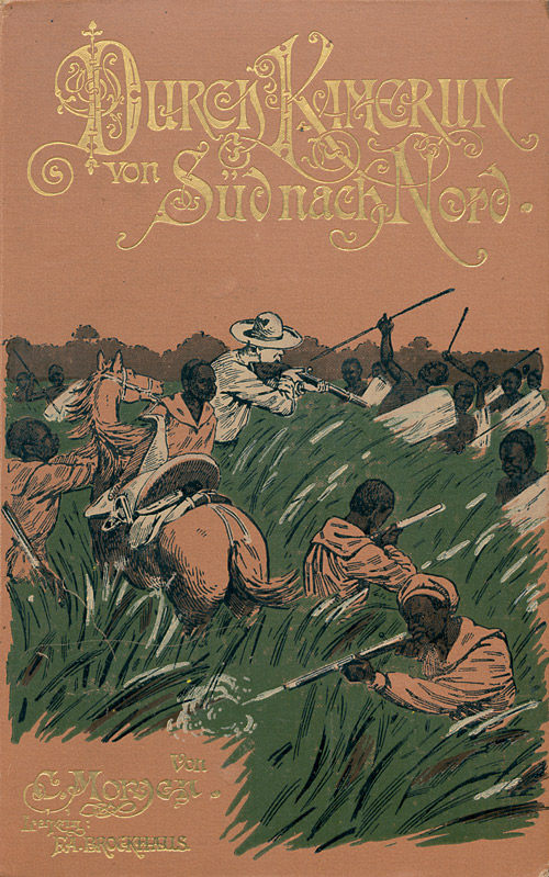 Bucheinband: Curt Morgen: "Durch Kamerun von Süd nach Nord. Reisen und Forschungen im Hinterlande 1889 bis 1891". Leipzig, Brockhaus, 1893.